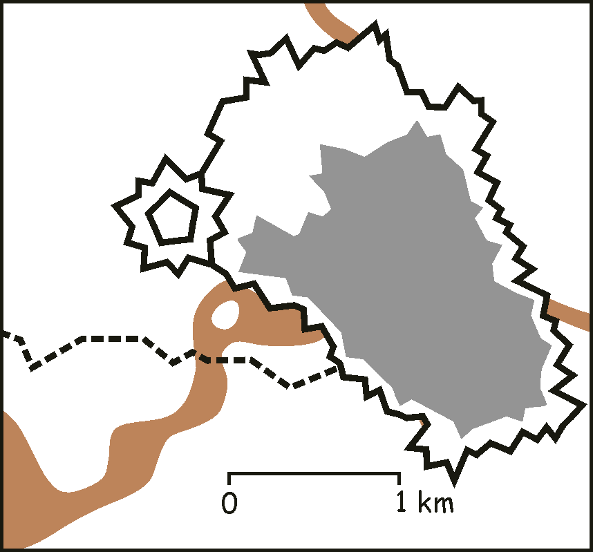 Utilisateur:Laurent Deschodt Summary position approximative de l'enceinte Vauban de Lille en grisé : enceinte antérieure Catégorie:Cartes et plans de Lille